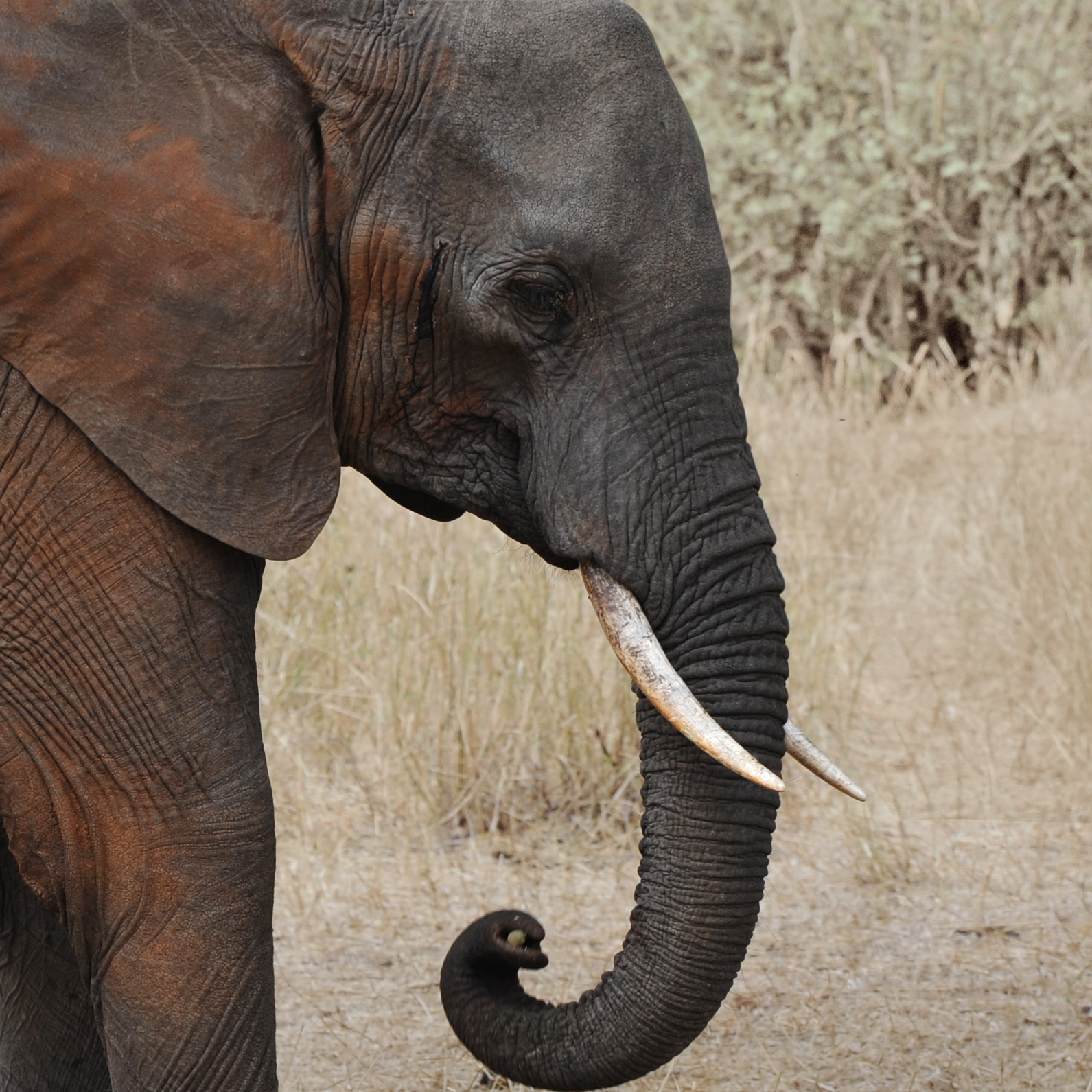 Eléphant, portrait, parc national de Tarangire